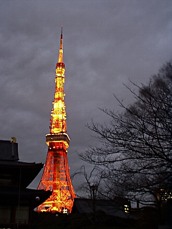 Temple Zojo in Tokyo,Japan